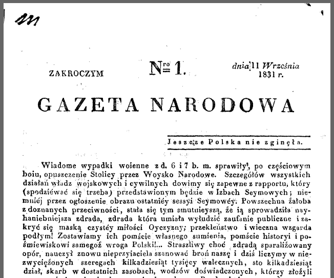 polska prasa pod zaborami